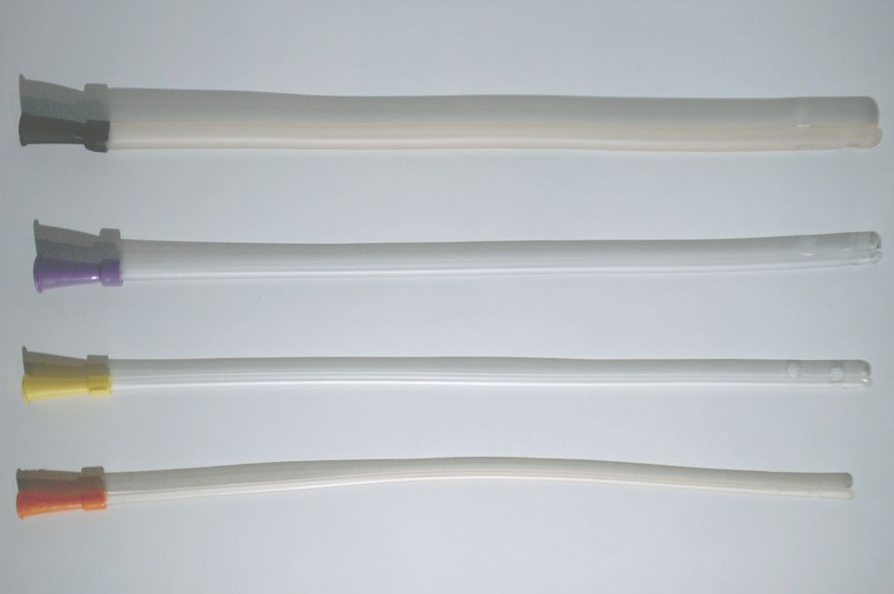 Einmal-Darmrohre zum Einlauf.